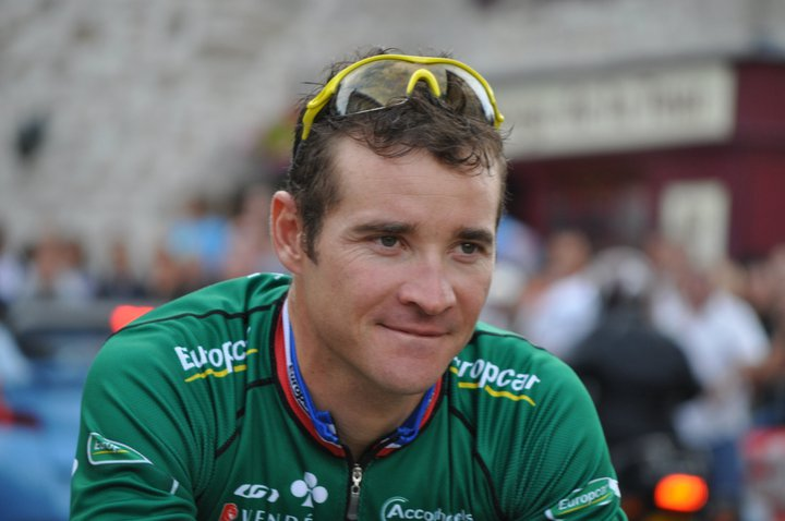 Thomas Voeckler